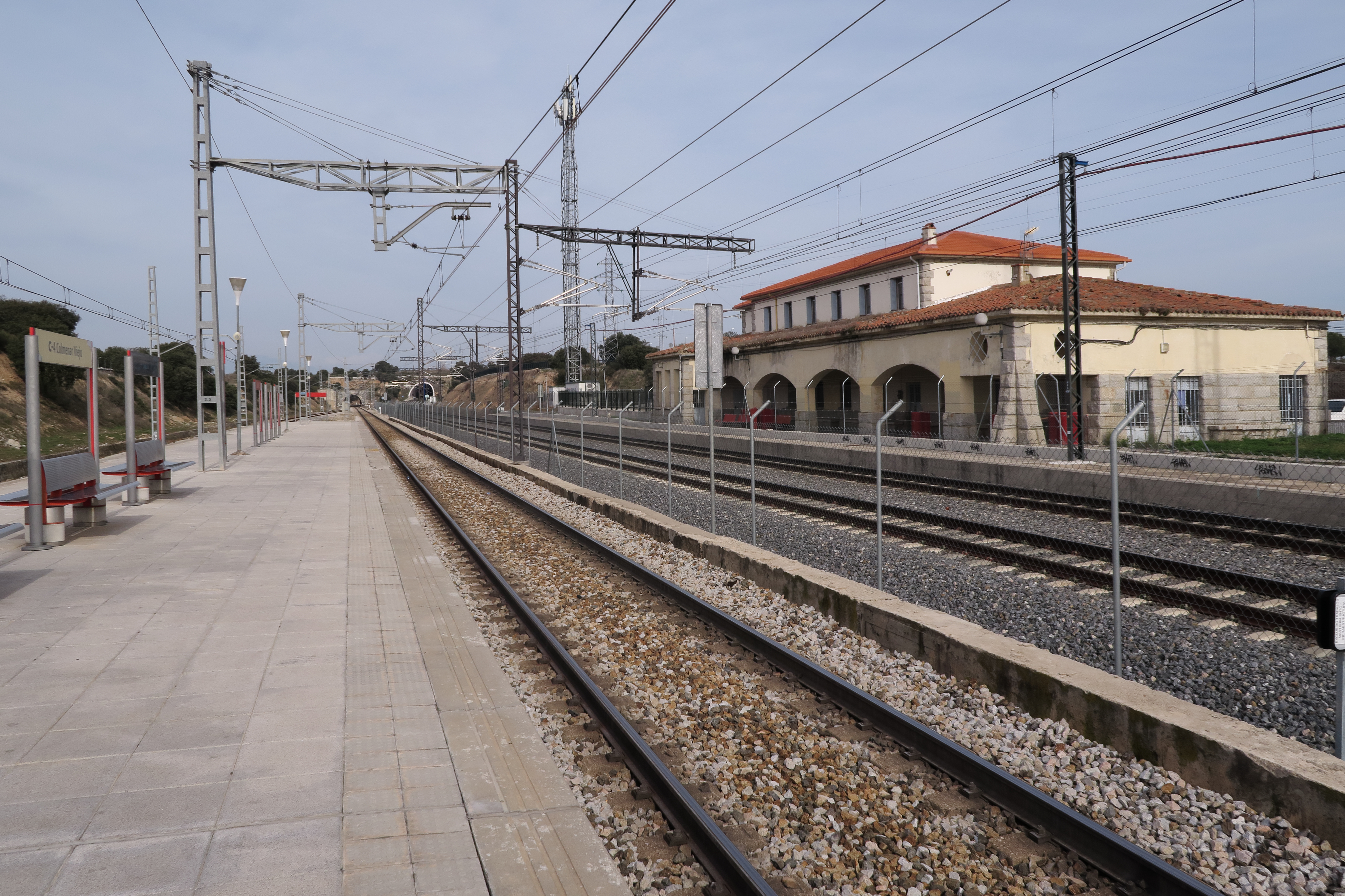 Estación de El Goloso (Madrid).